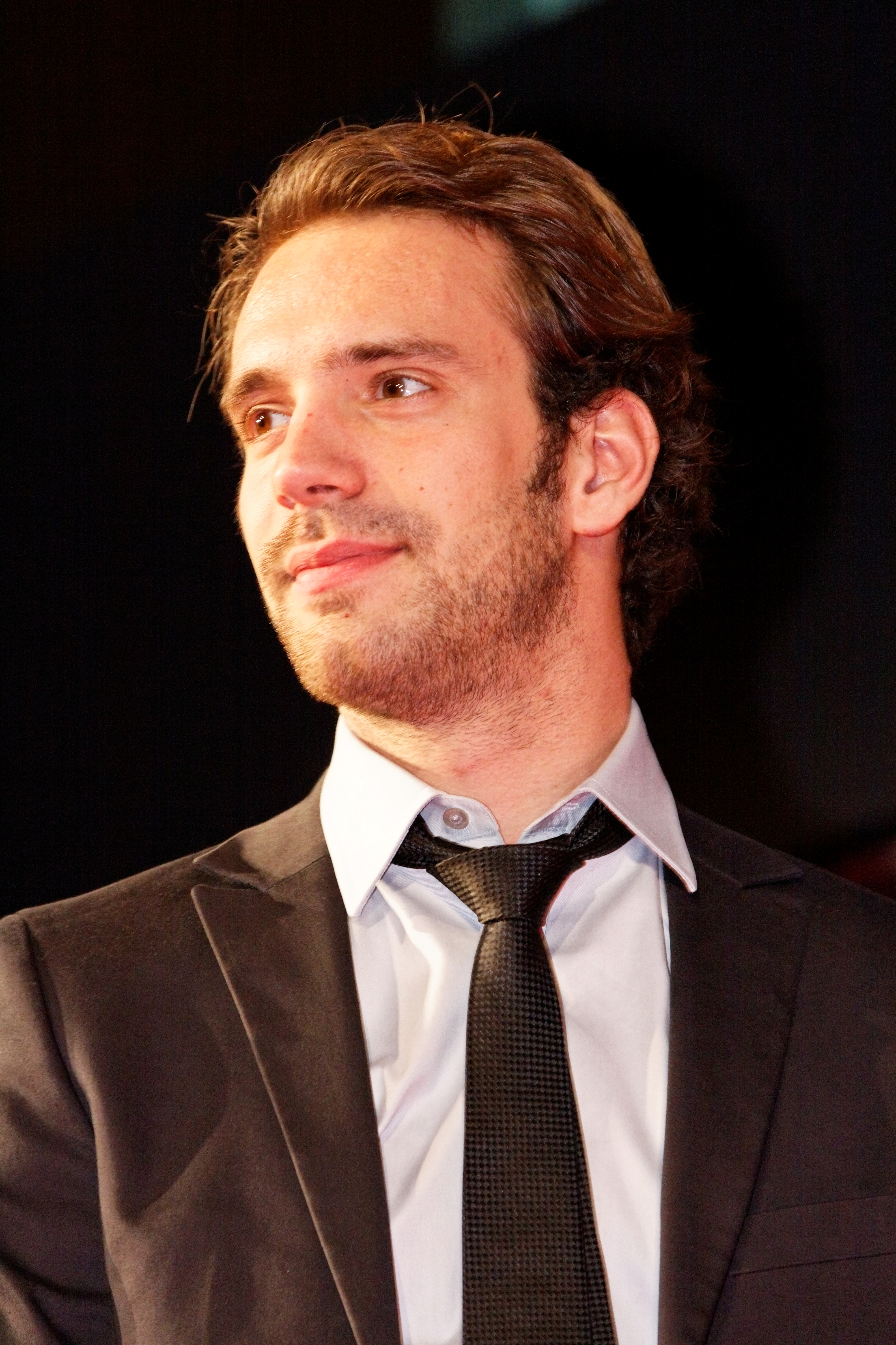 Jean-Éric Vergne lors du photocall du festival automobile international 2012